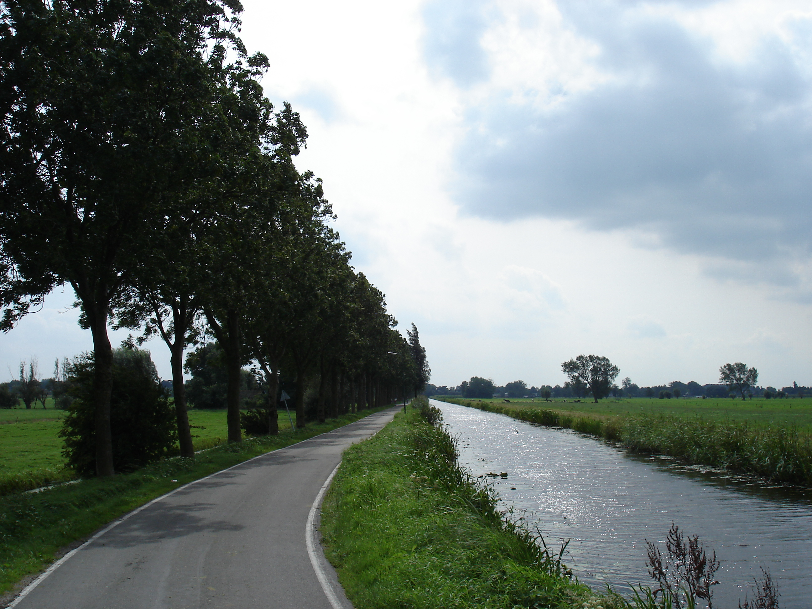 Cattenbroekerdijk te Cattenbroek in de gemeente Montfoort.